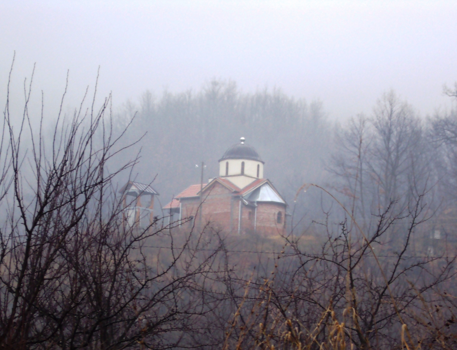 Црква у селу Жуч, Куршумлија